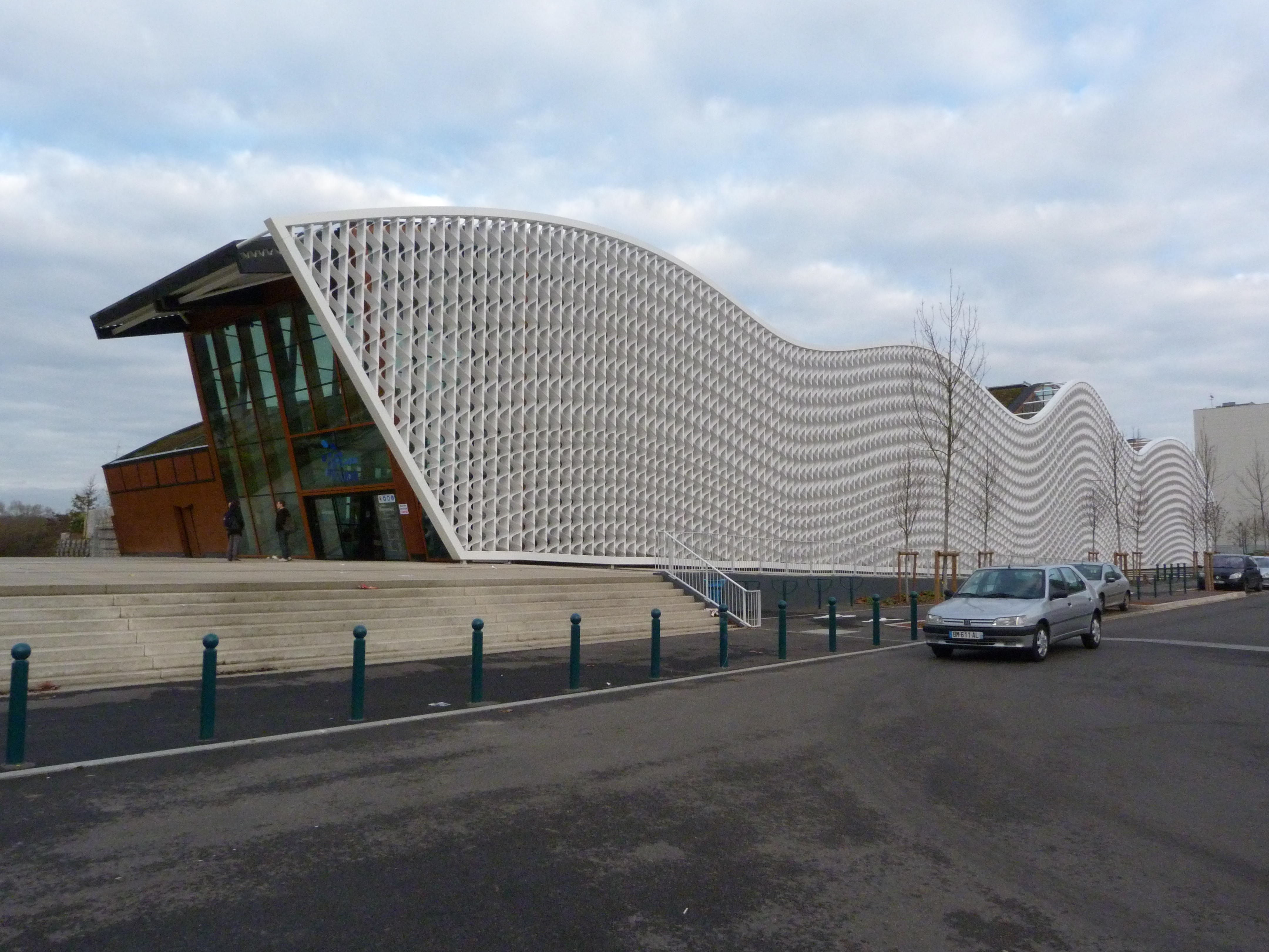 Entrée principale.